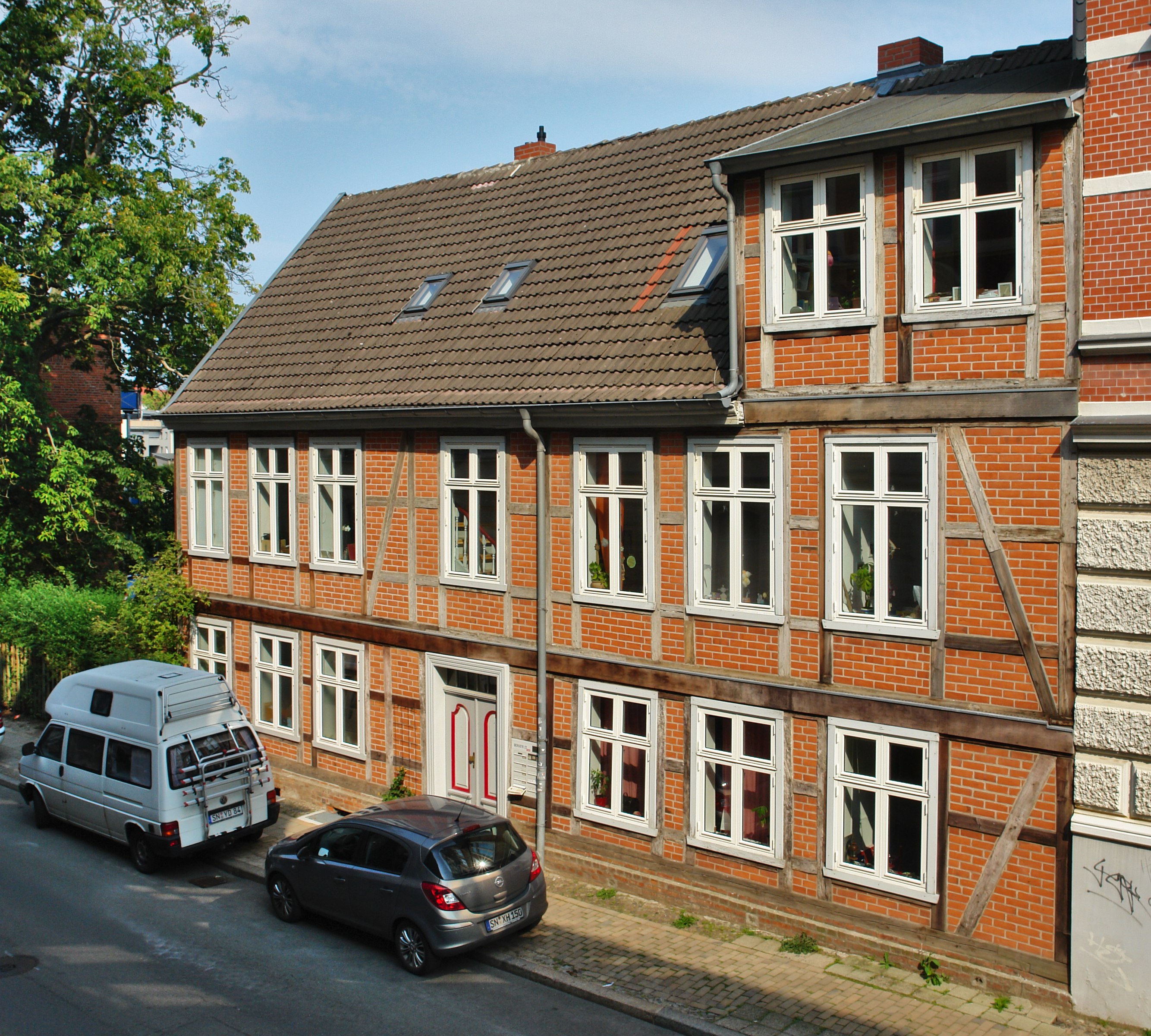 Bergstraße 22, 19055 Schwerin